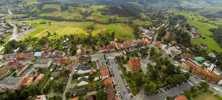 Jordanów Centrum